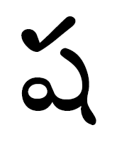 шакараму